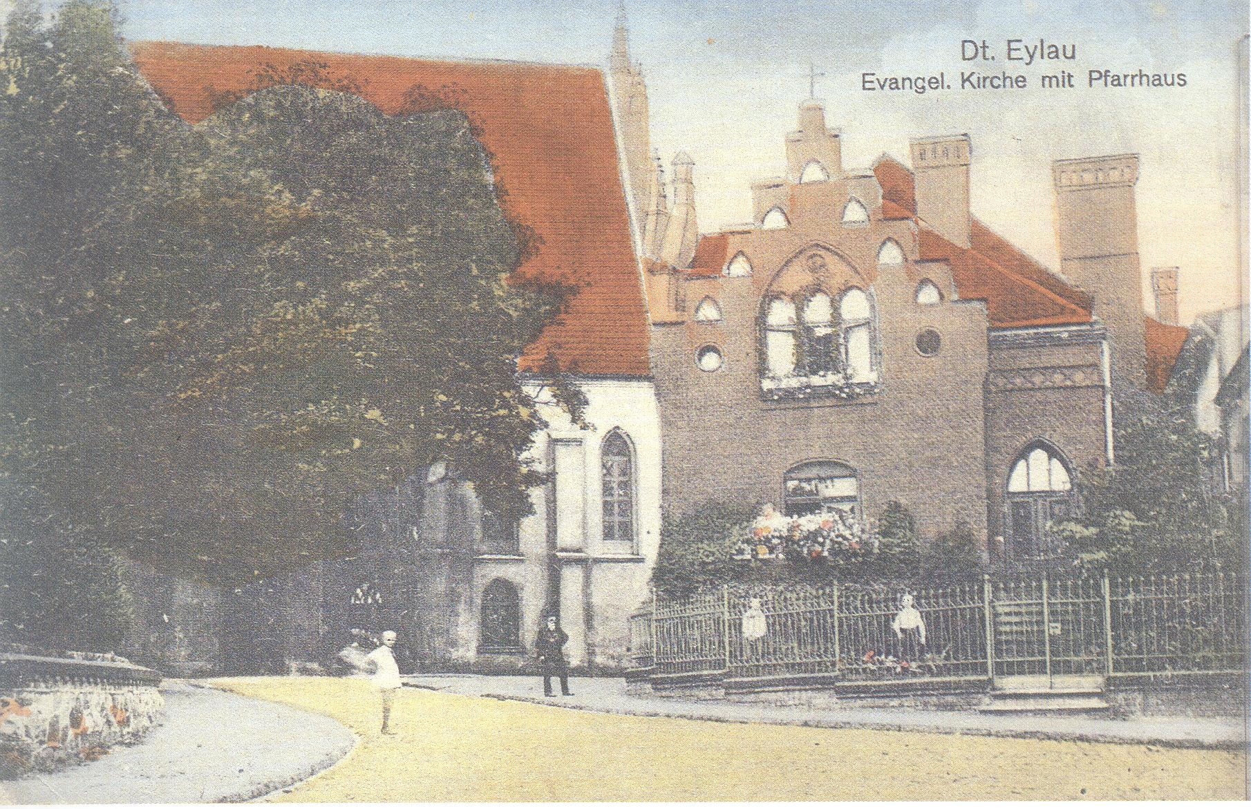 Kościół Przemienienia Pańskiego w Iławie w 1918 roku